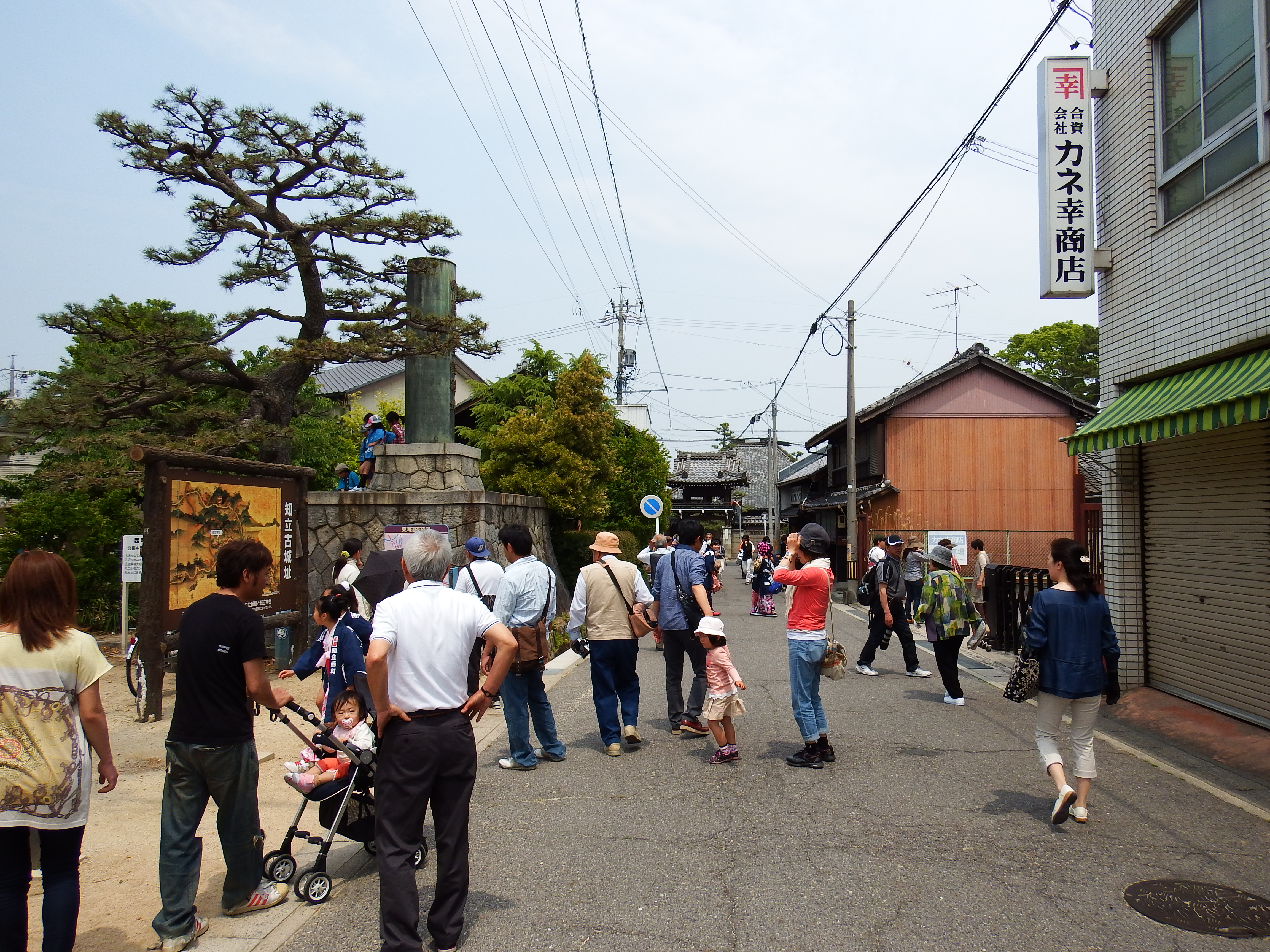 知立まつり